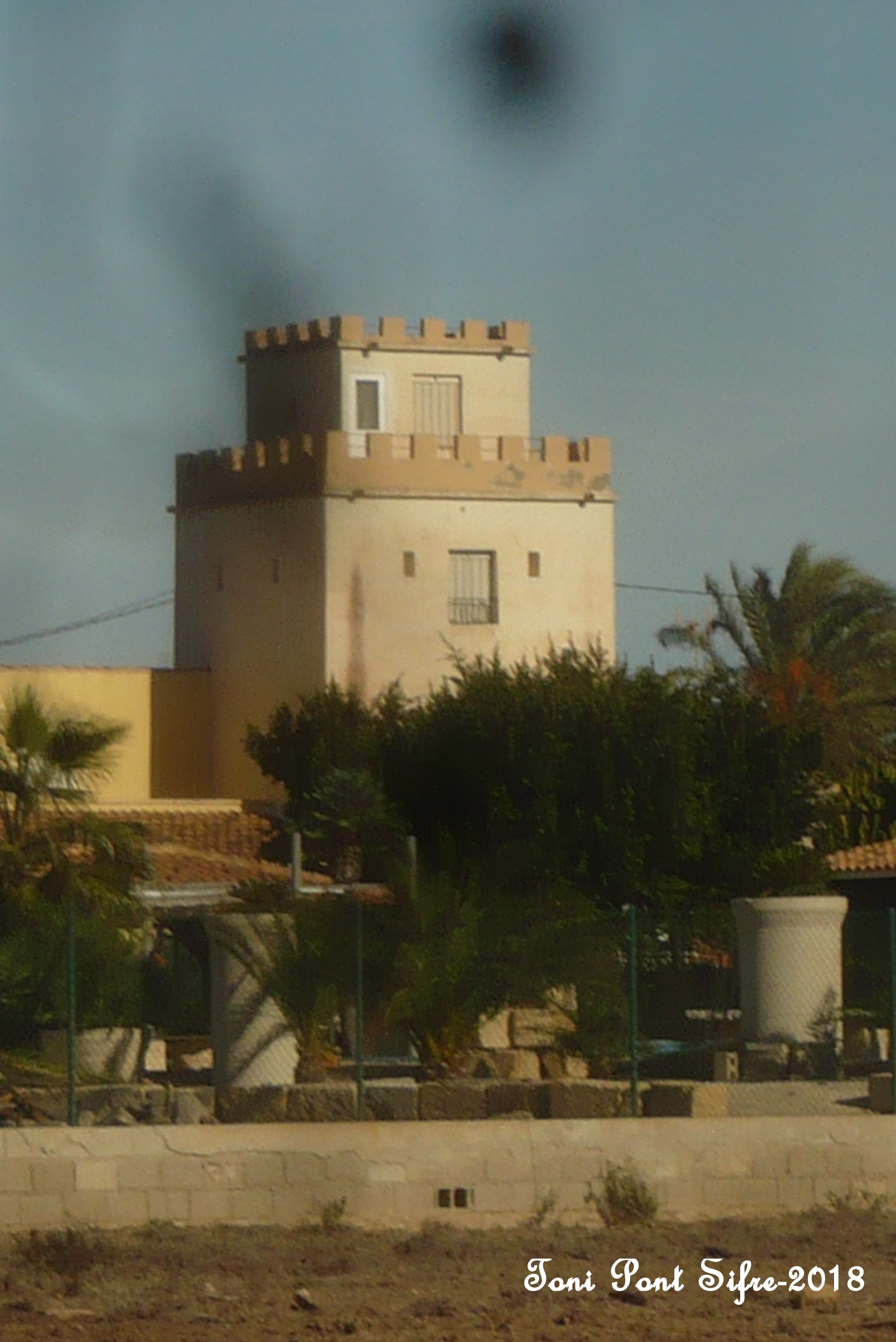 Torre de vigia de la Senieta